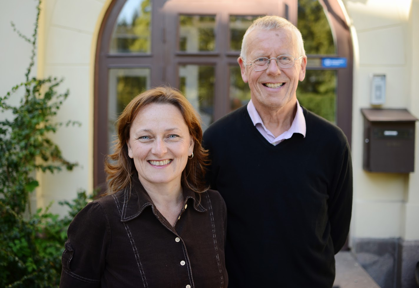 Anne Marit Godal og Trond Andreassen, sjefredaktør resp. styreleder til "Store norske leksikon".